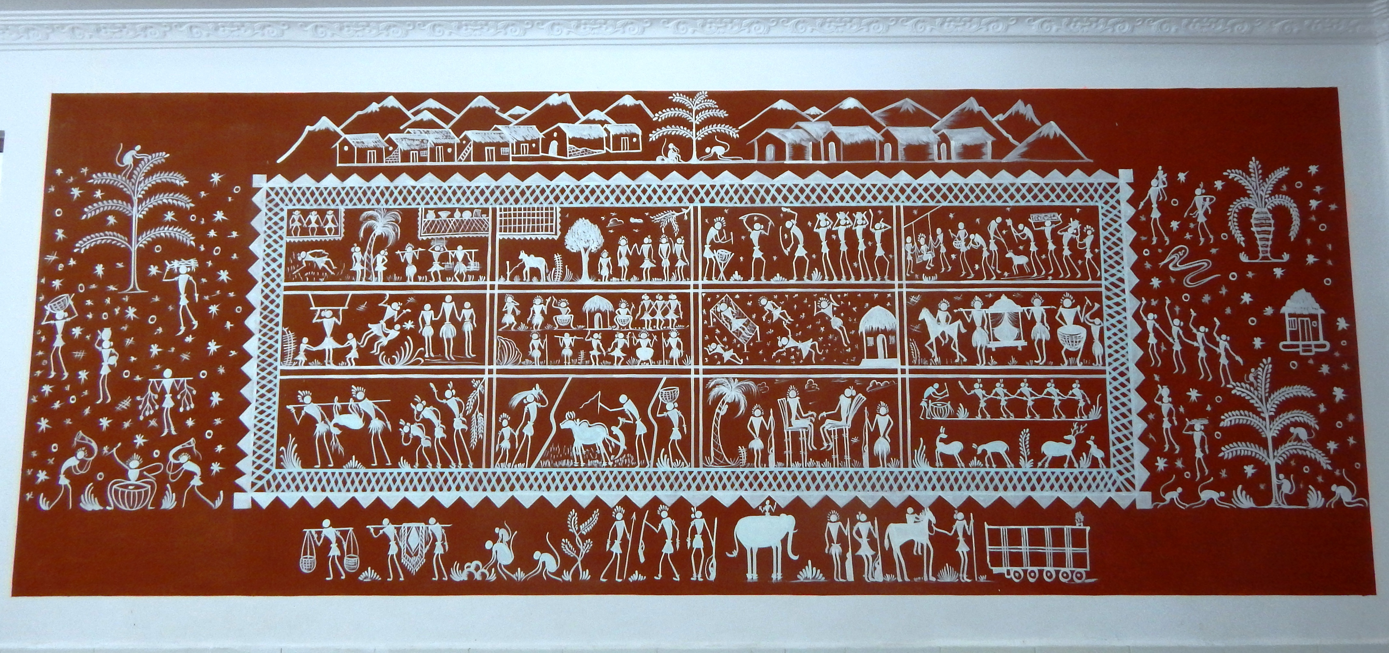 Idital- Soura Painting